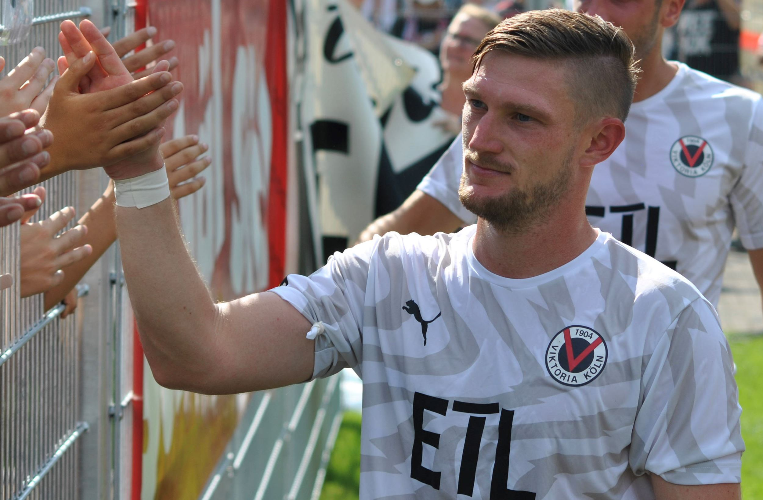 André Dej (Viktoria Köln) am 31.8.2019 nach dem Spiel gegen Ingolstadt